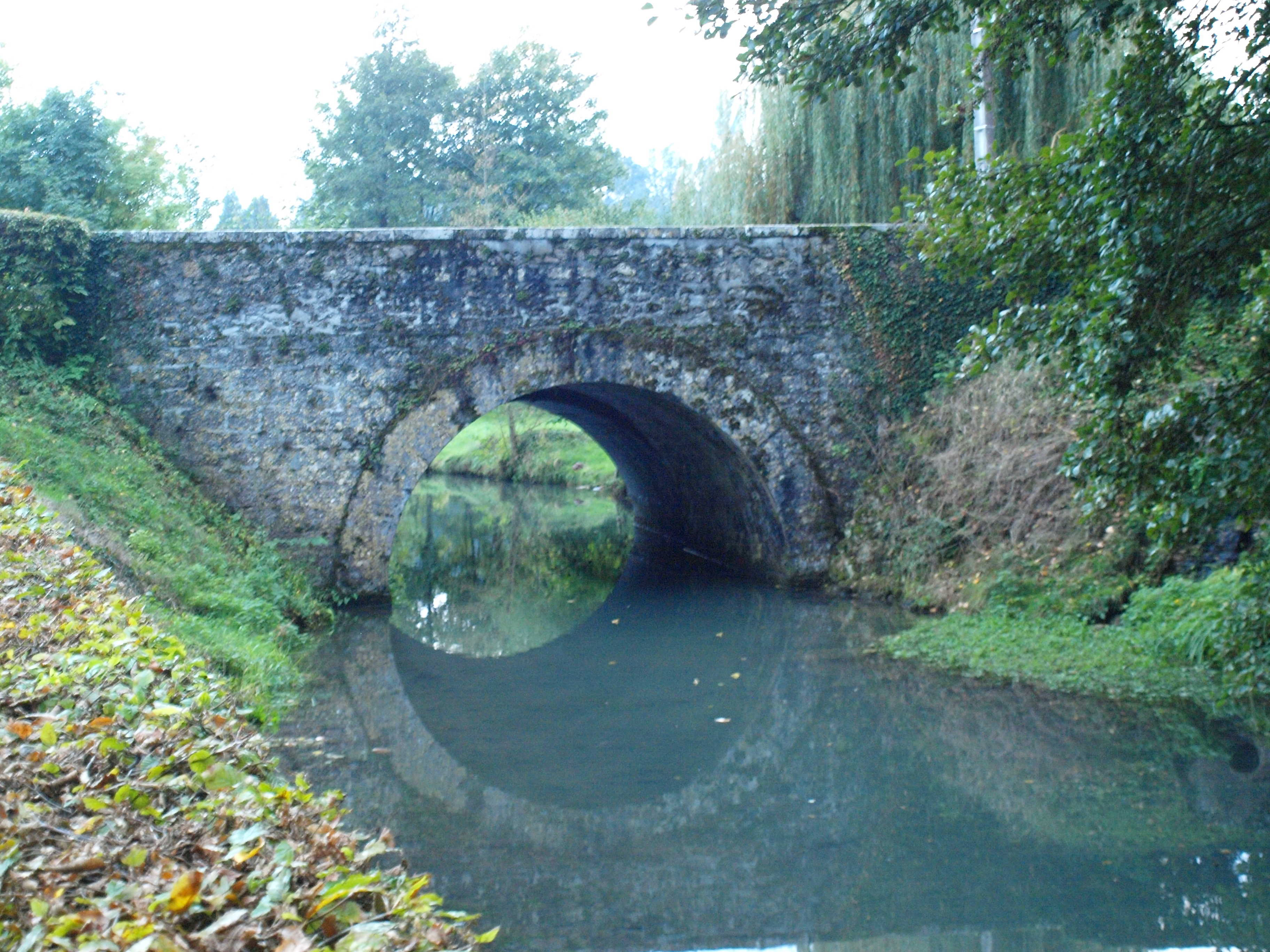 Chevannes (Loiret, France), le pont sur la Sainte-Rose.